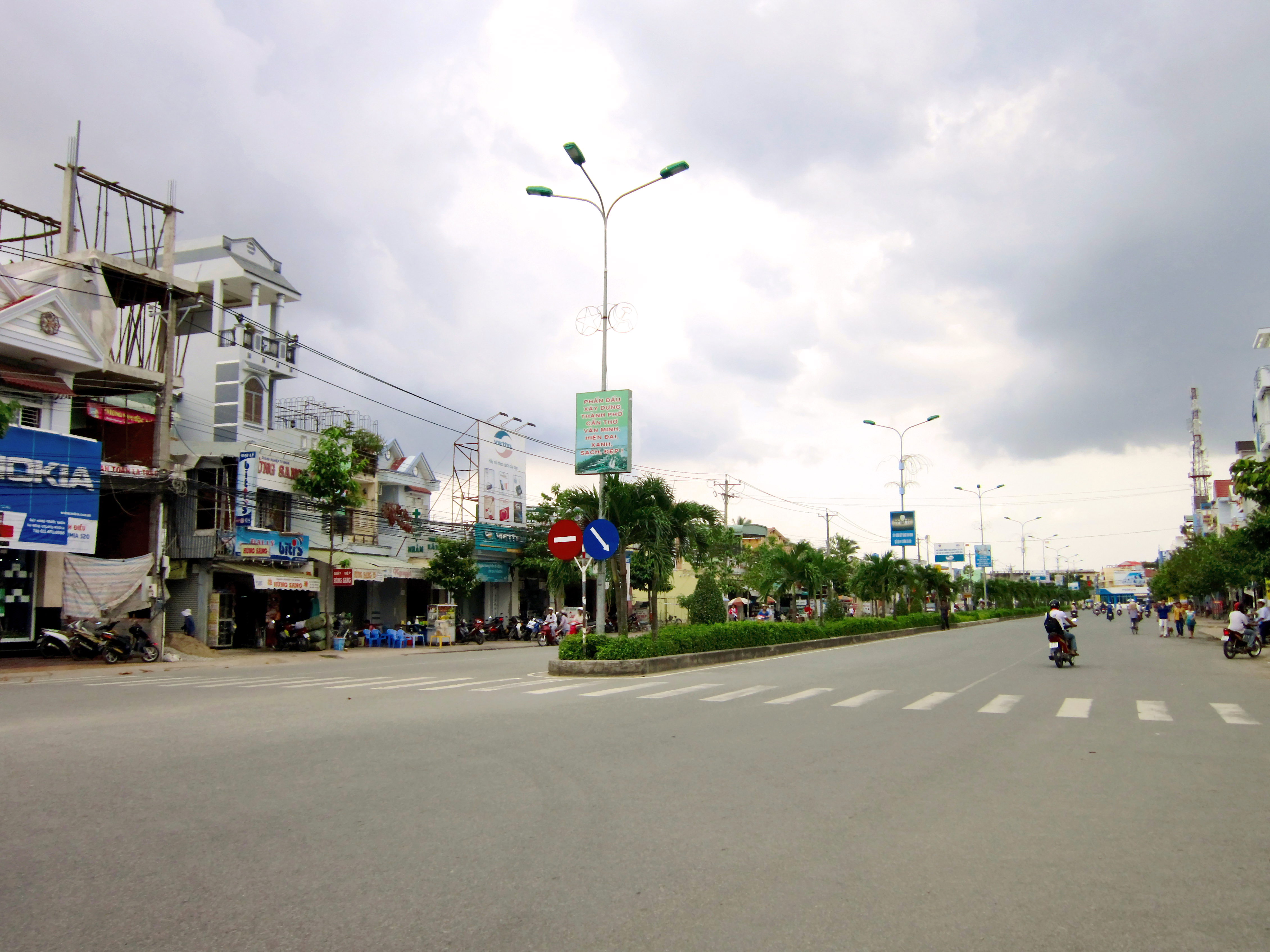 Đại lộ Trần Hưng Đạo ở trung tâm huyện Ô Môn, Cần Thơ, Việt Nam.